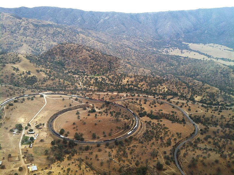 Letecký pohled na Tehachapi Loop